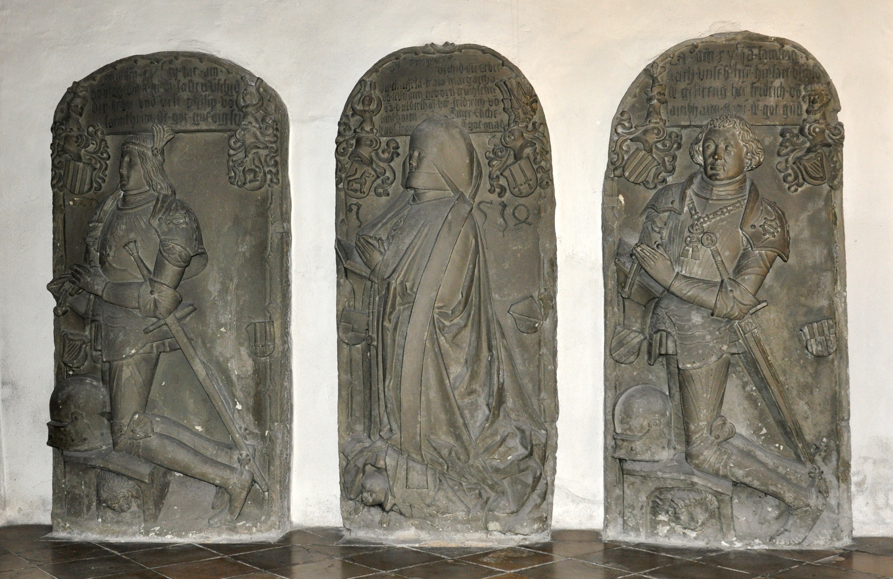 Marktbreit, Evangelisch-lutherische Stadtpfarrkirche St. Nikolai, Seinsheim-Epitaphien, von rechts nach links: Friedrich von Seinsheim, Sohn des Engelbert, †1500 (mit der Kette des Schwanenordens und dem Fürspänglerorden auf der Schulter) Margarete von Seinsheim, geb. Truchseß von Baldersheim, †1514. Sohn Philipp von Seinsheim, †1503